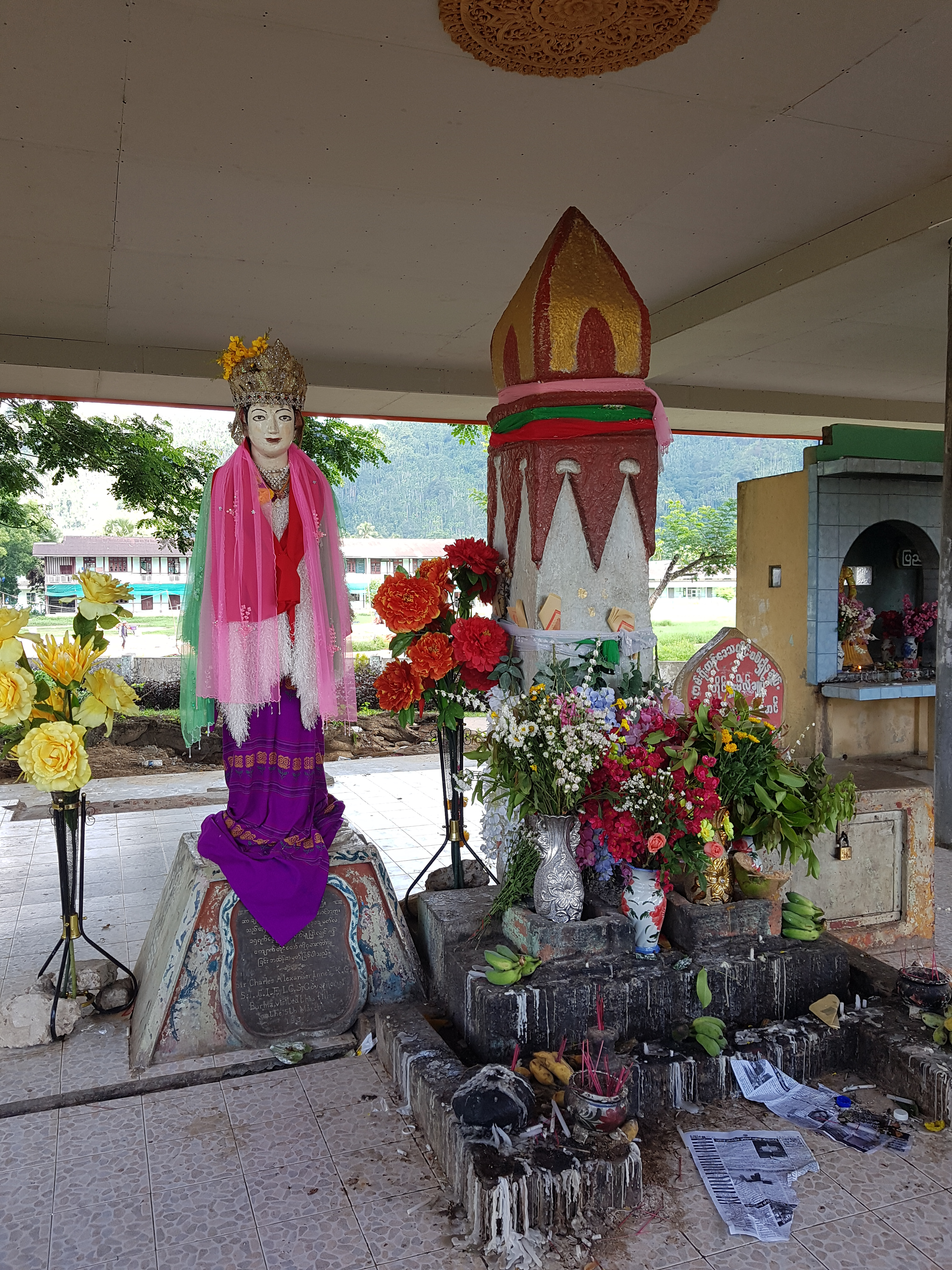 မ​အောင်သာ နတ်ကွန်း